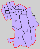 福島県北会津郡の町村。